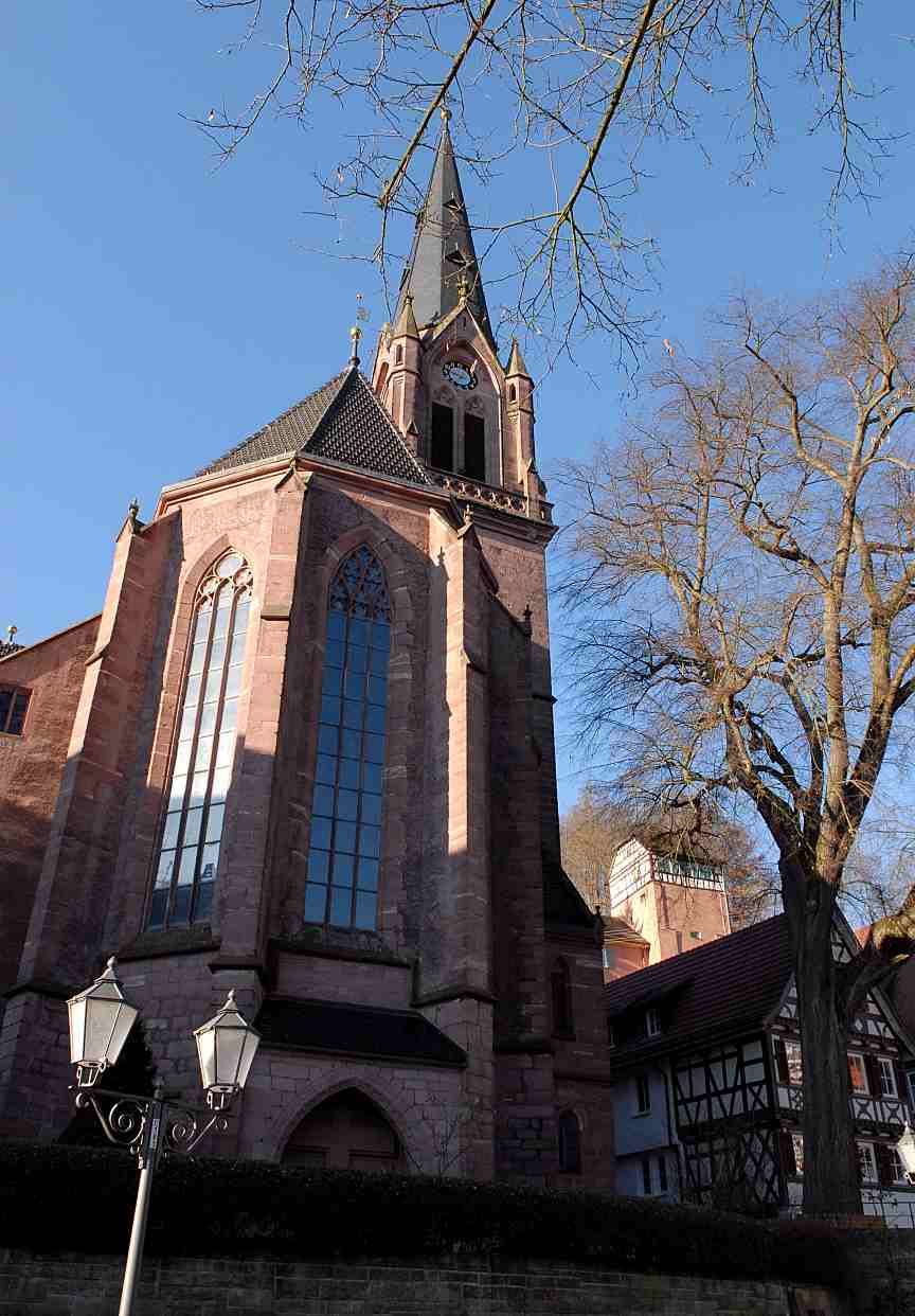 Stadtkirche Calw (Baden-Württemberg, Germany)